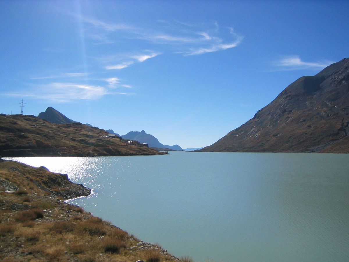 Lago Bianco